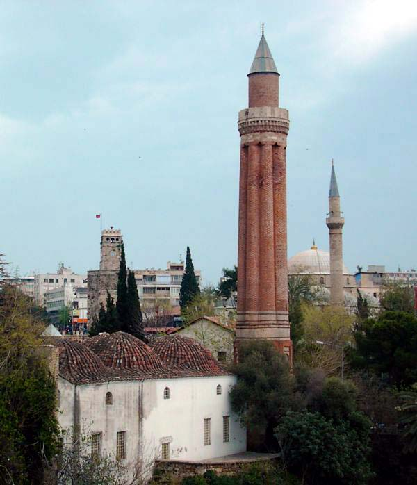 Altstadt von Antalya mit Wahrzeichen